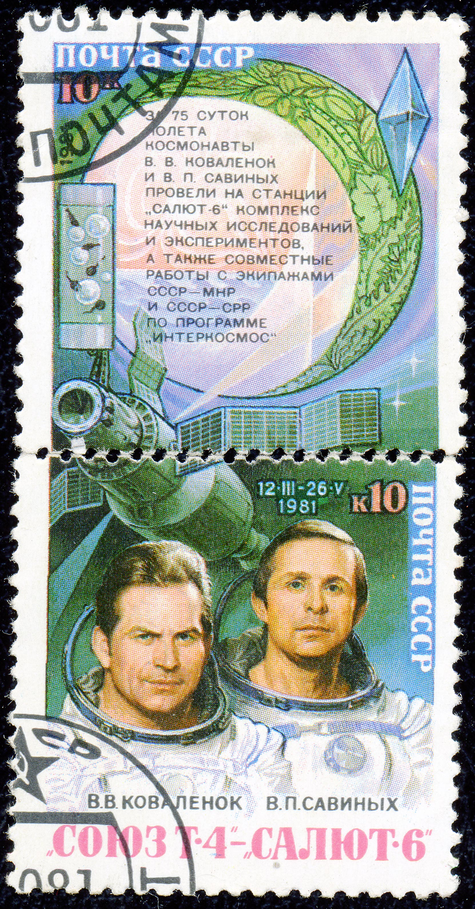 Почтовая марка СССР. 1981. Союз-Т4 - Салют-6. В.В. Коваленюк, В.П. Савиных (1)